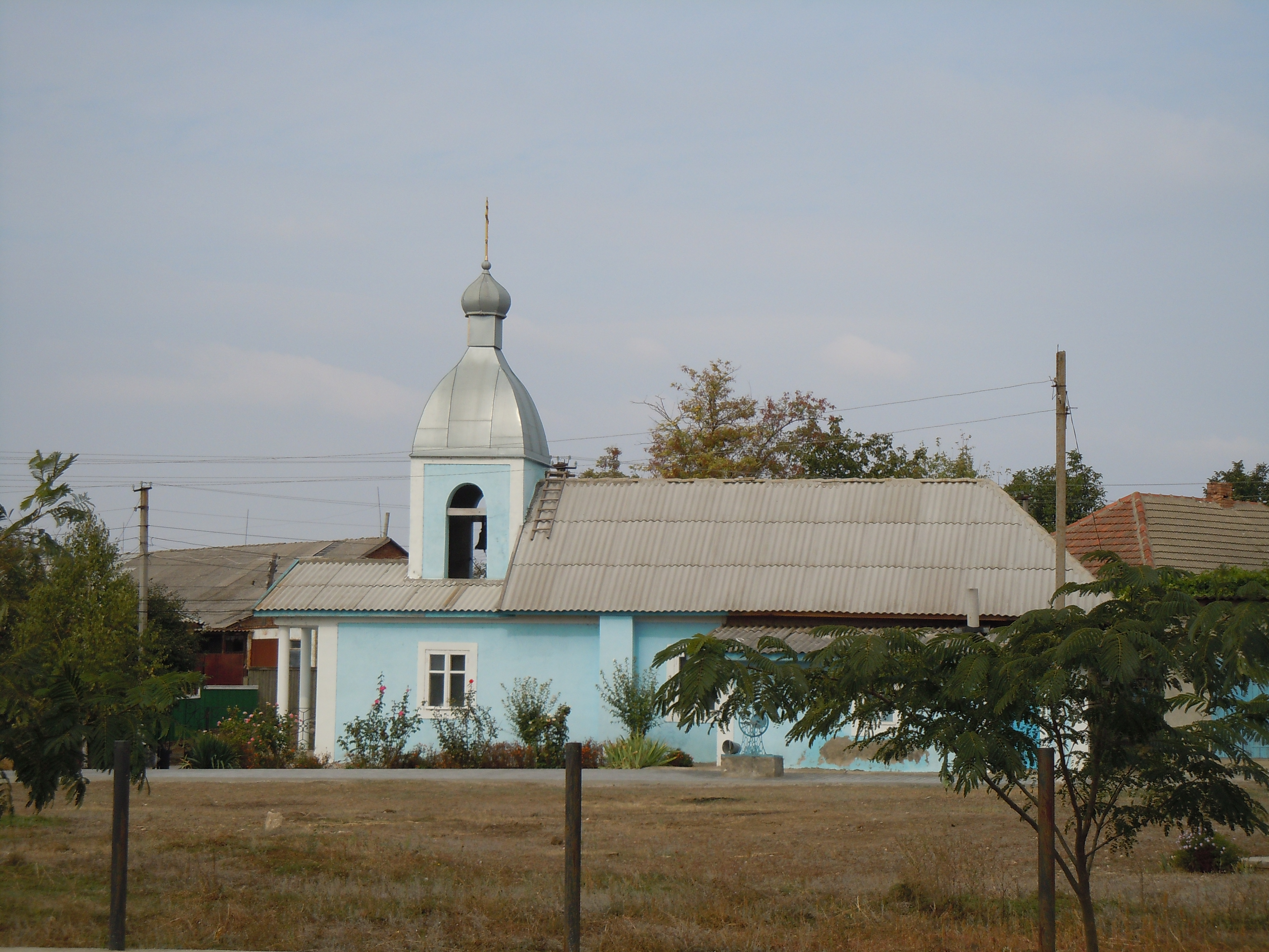 Церква Різдва Богородиці в селі Каракурт, Болградський район, Одеська область